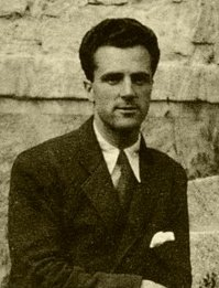 Fotografía del pasaporte de Miguel Catalán Sañudo (hacia 1920)